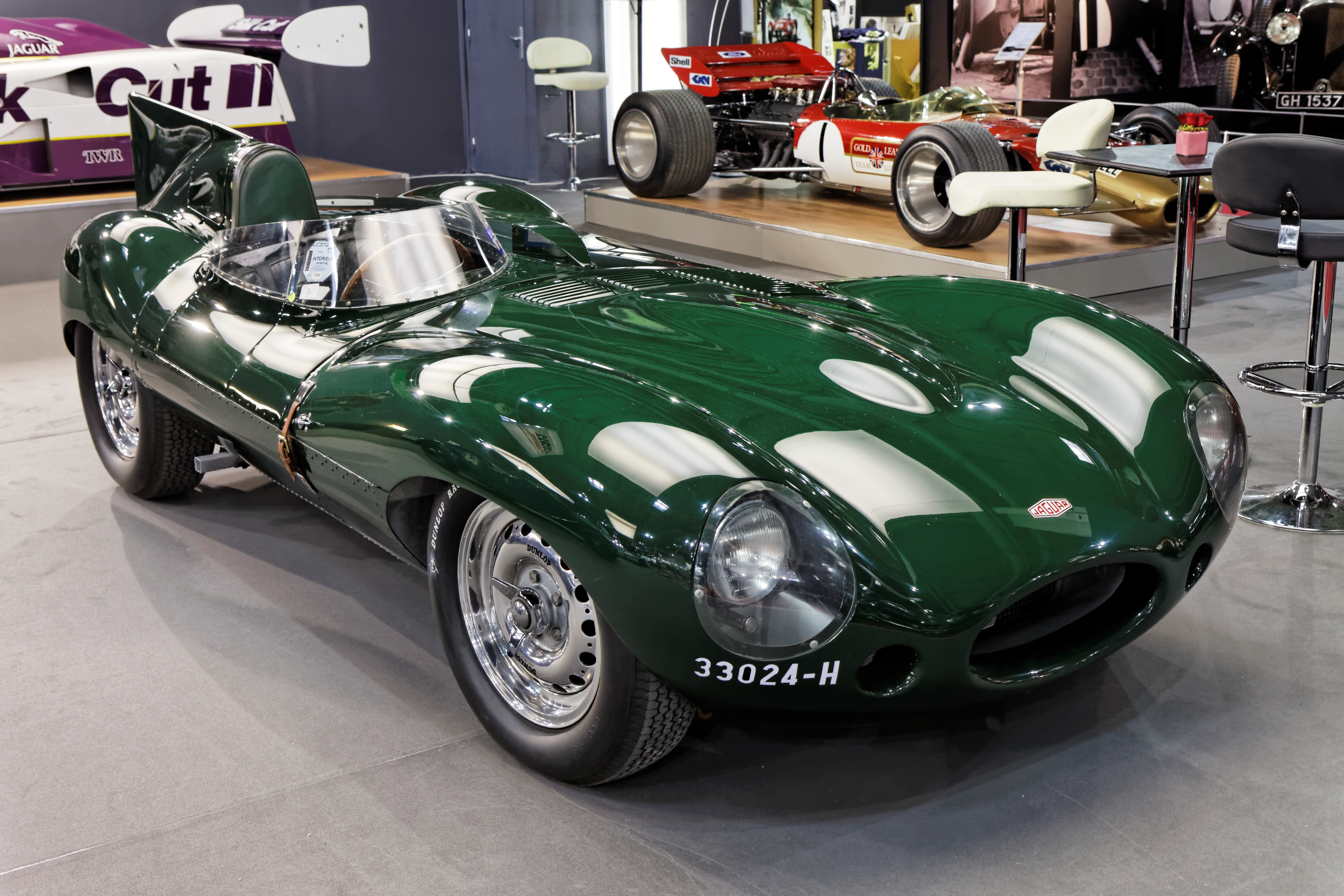 Une Jaguar D Type présentée lors du salon Retromobile 2013.